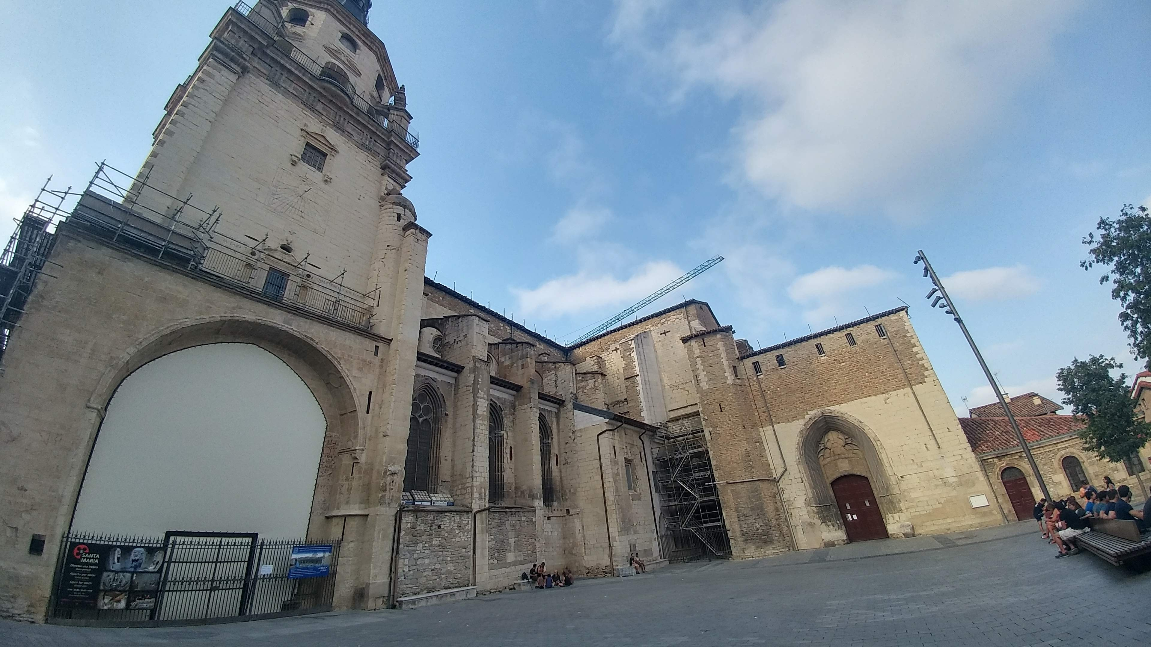 Gasteizko Santa Maria plaza